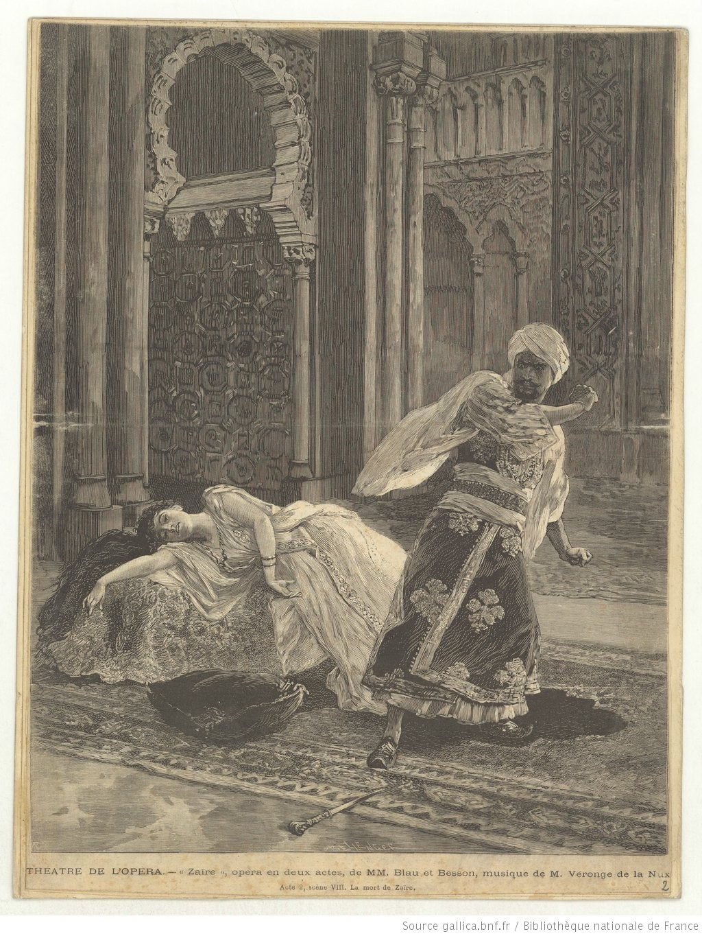 Gravure d'Albert Bellenger représentant la mort de Zaïre, acte 2, scène VIII de Zaïre, opéra en deux actes, livret de MM. Blau et Besson, musique de M. Véronge de la Nux, créé à Paris au Théâtre national de l'Opéra le 28 mai 1890